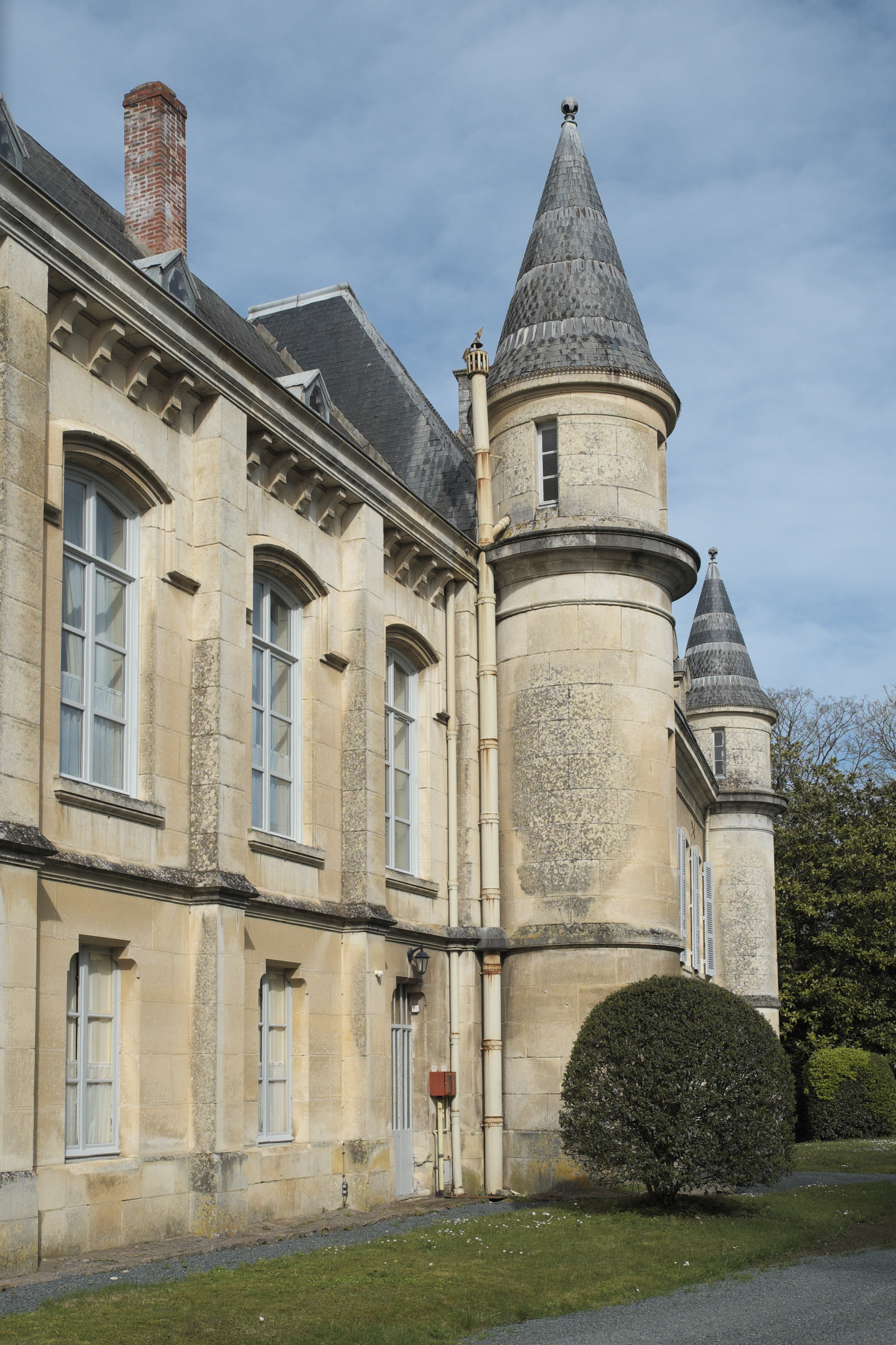 Bischofspalast in Luçon im Département Vendée (Pays de la Loire/Frankreich), neogotische Kanzel von 1893